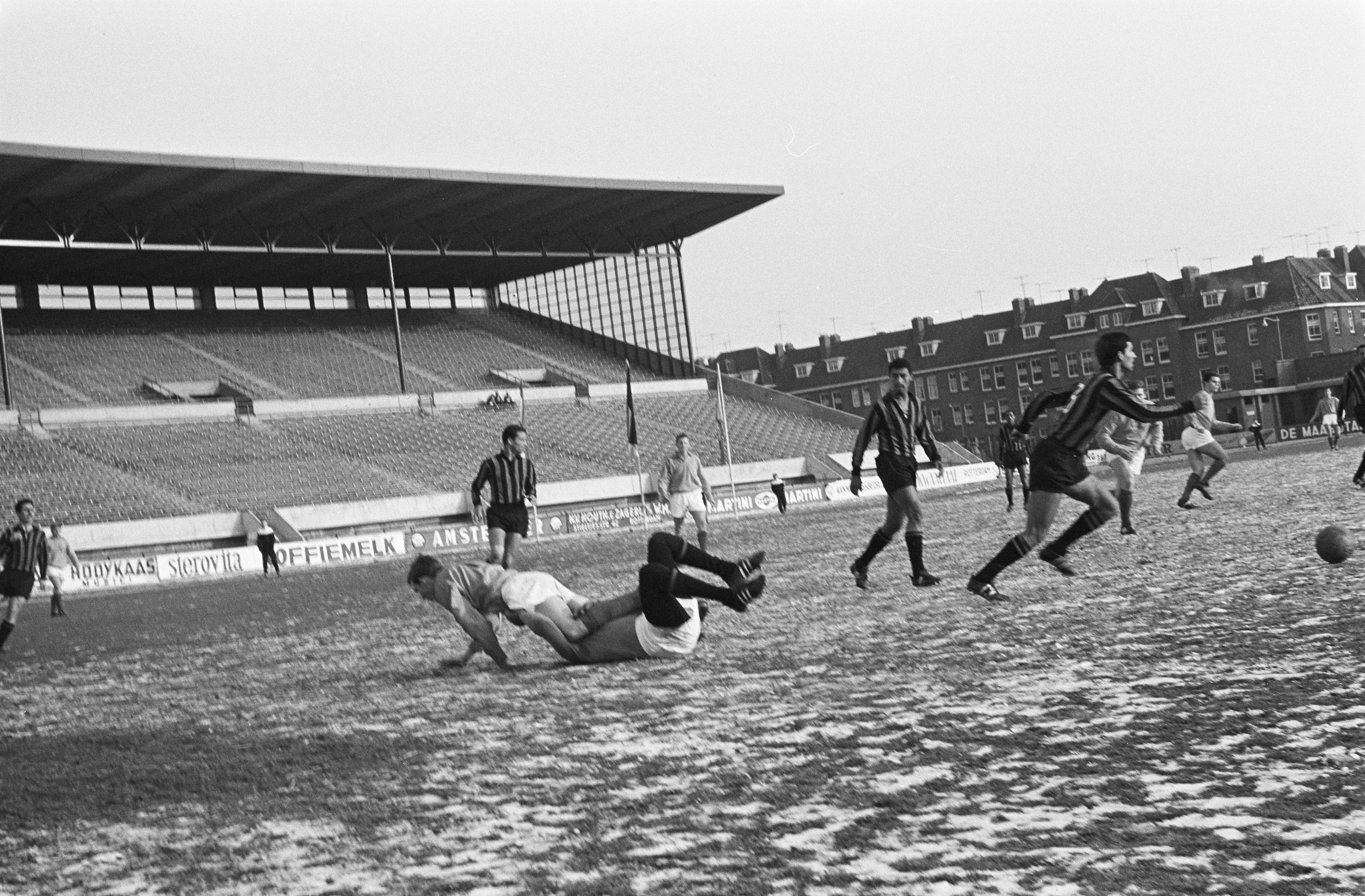 Collectie / Archief : Fotocollectie Anefo Reportage / Serie : [ onbekend ] Beschrijving : Nederland tegen Marokko 5-0, spelmomenten Datum : 15 januari 1964 Locatie : Marokko, Nederland Trefwoorden : sport, voetbal Fotograaf : Koch, Eric / Anefo Auteursrechthebbende : Nationaal Archief Materiaalsoort : Negatief (zwart/wit) Nummer archiefinventaris : bekijk toegang 2.24.01.05 Bestanddeelnummer : 915-9499